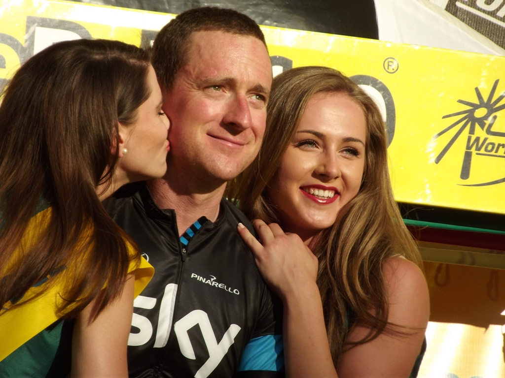 Zdjęcie zrobione podczas VII etapu 70. jubileuszowego Tour de Pologne w Krakowie.